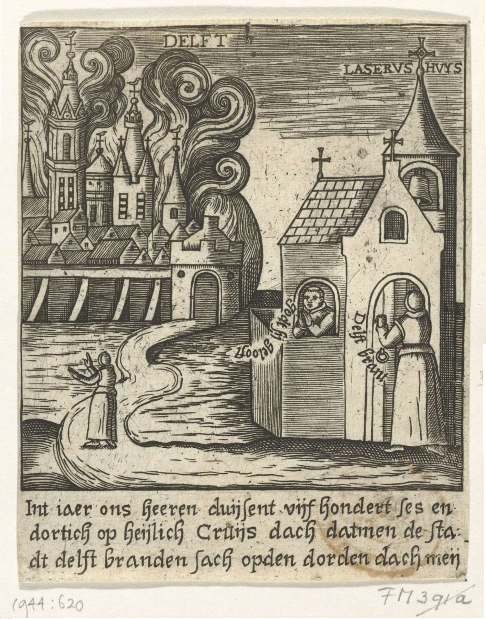 Gravure anonyme du XVIe siècle. Des moines de la maison Lazarus, à l'extérieur de la ville, voient au loin la ville de Delft en feu, le 3 mai 1536. L'inscription en dessous mentionne l'année de la catastrophe. Les deux églises (Oude Kerk et Nieuwe Kerk) apparaissent au second plan, au milieu des flammes.